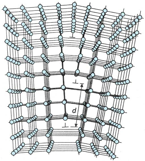 Szemcsehatár-menti éldiszlokáció